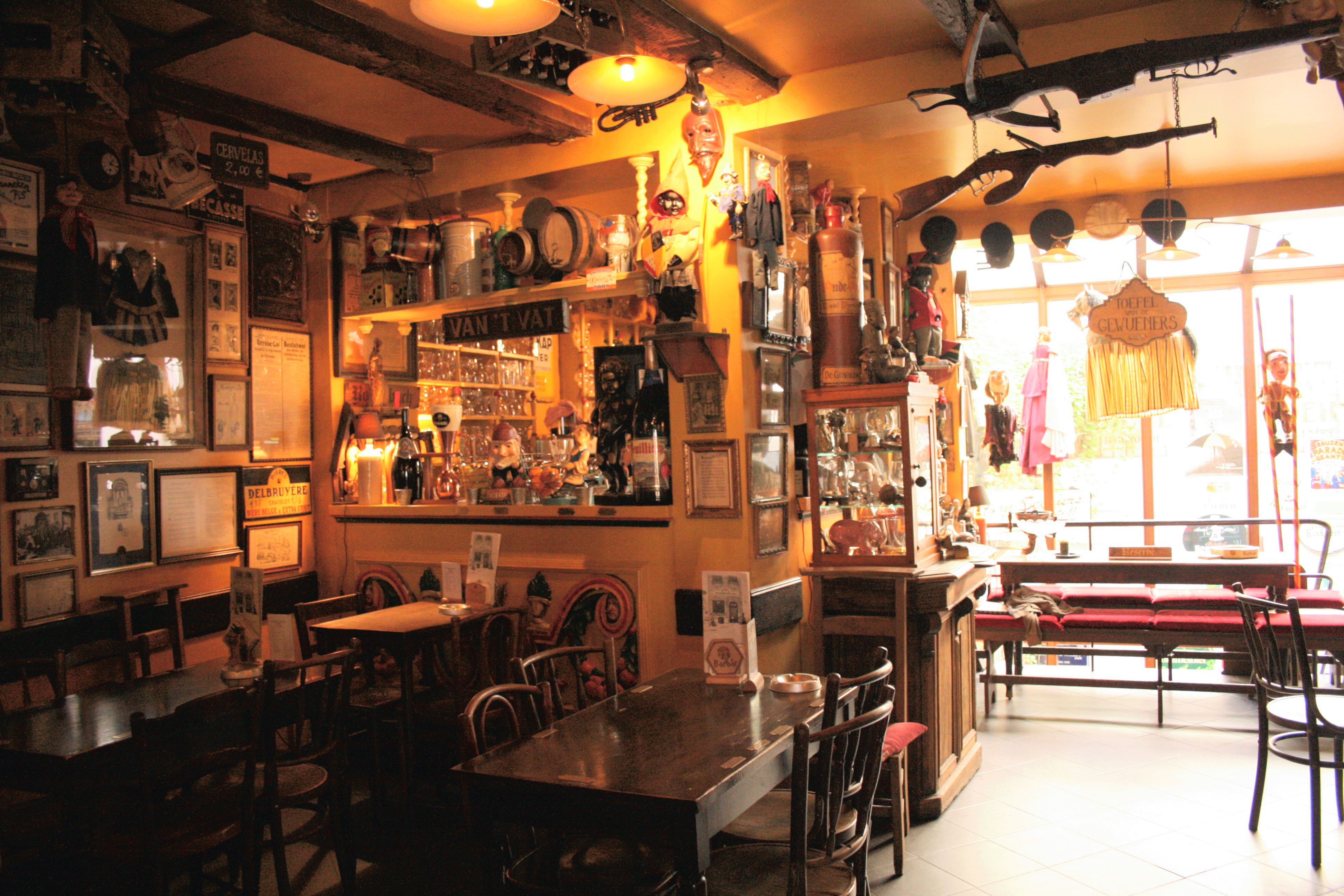 Café "Le Poechenellekelder", 5 rue du Chêne, Bruxelles, Belgique. Intérieur